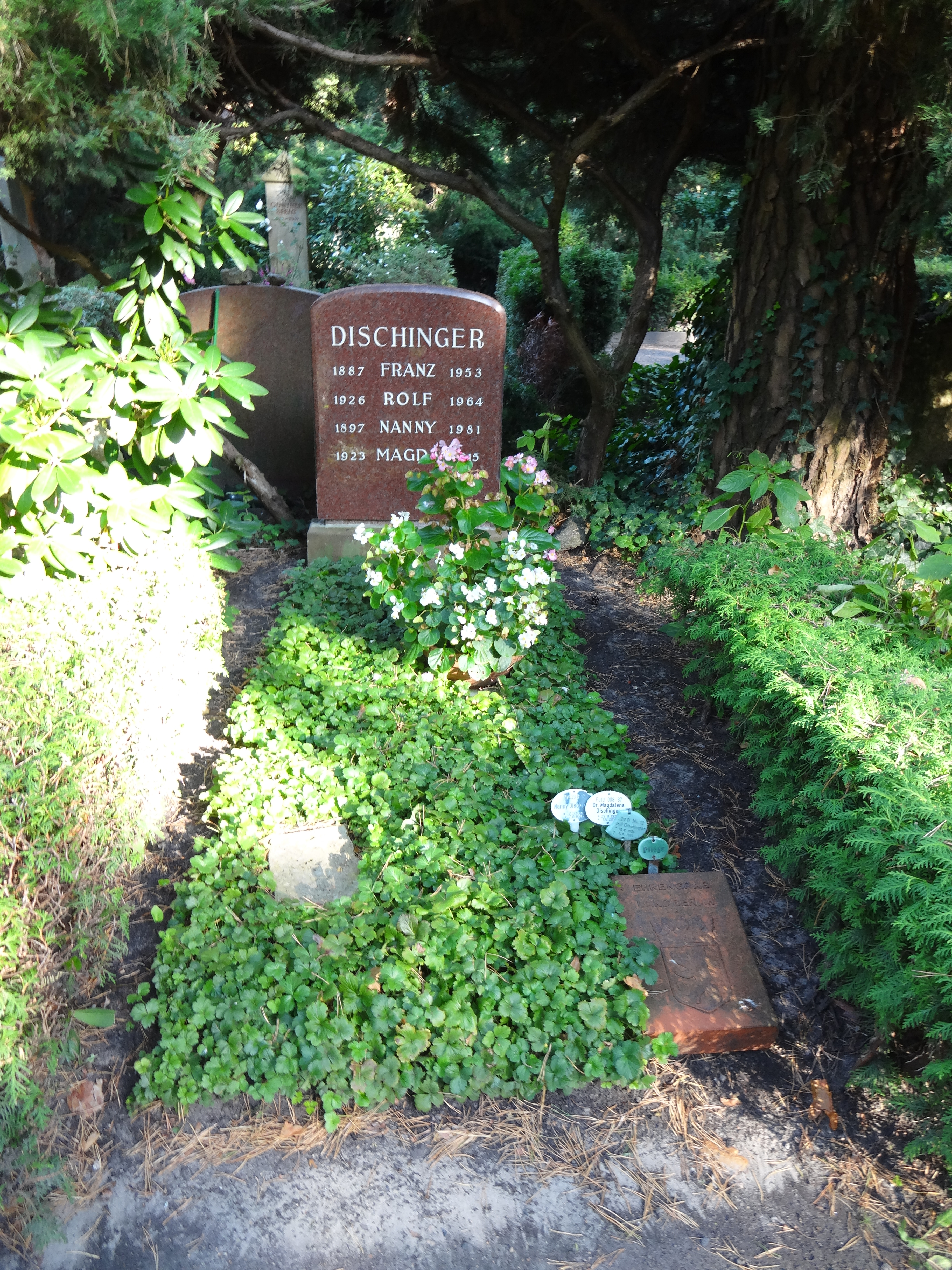 Ehrengrab von Franz Anton Dischinger auf dem Waldfriedhof Dahlem, der Friedhof ist als Gartendenkmal der Stadt Berlin (Nr. 09045949)This is a photograph of an architectural monument.